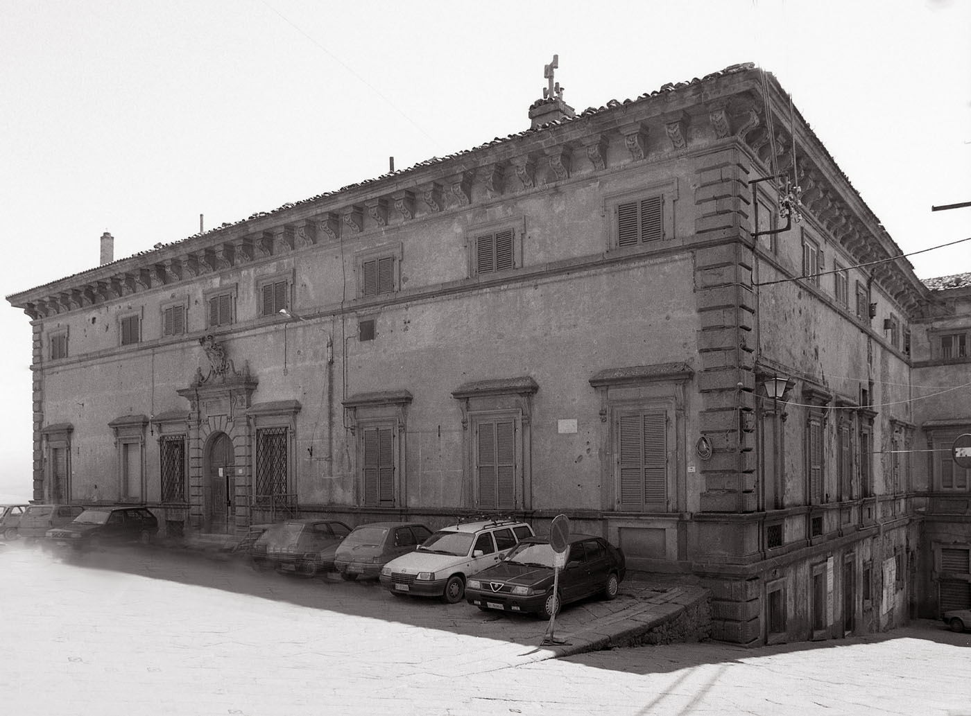 Palazzo Bourbon Del Monte (1995)